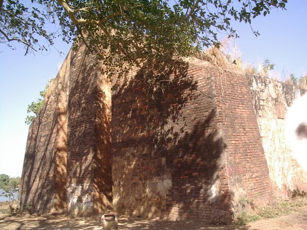 Casa d'esclaus de Janjang-bureh (George Town)